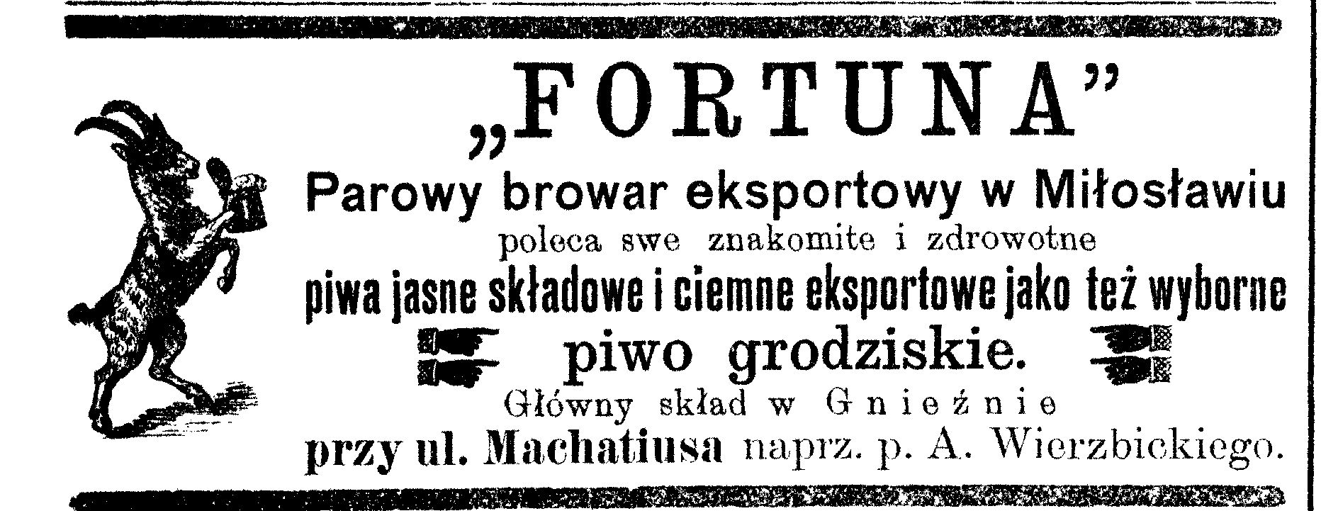 Reklama gnieźnieńskiego sklepu firmowego Browaru Fortuna. Sklep mieścił się przy Machatiusstrasse (od 1919 r. - ul. S. Moniuszki). W ofercie ze stycznia 1897 r. m.in. piwo grodziskie.